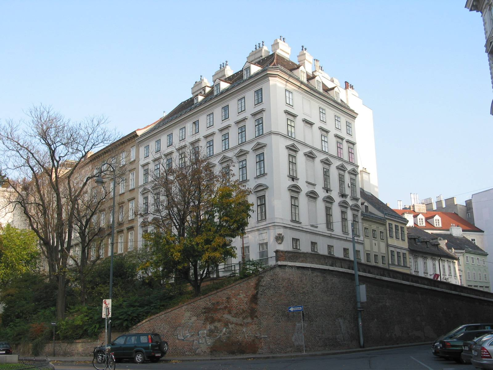 Pasqualatihaus, Vienna I, 2005-10-31 selfmade photo